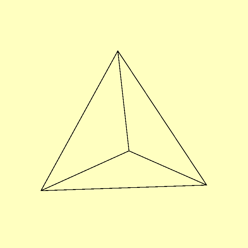 tetraedro regolare immagine creata da me con geomview e gimp